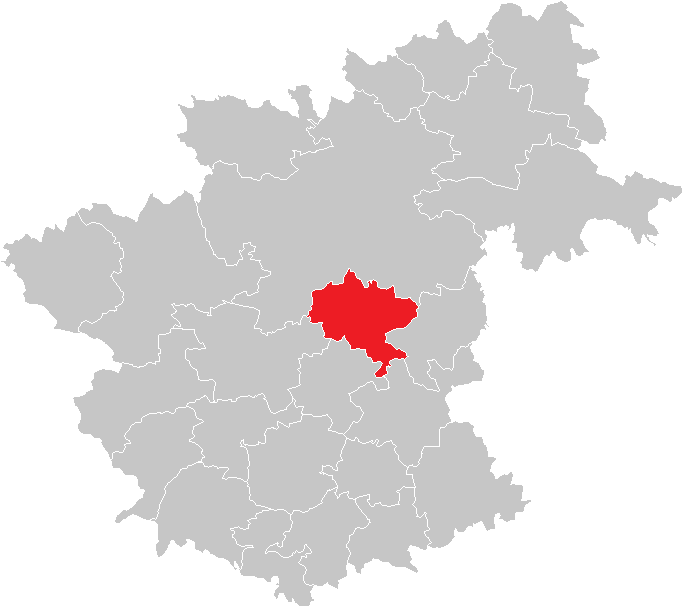 Bezirk Zwettl